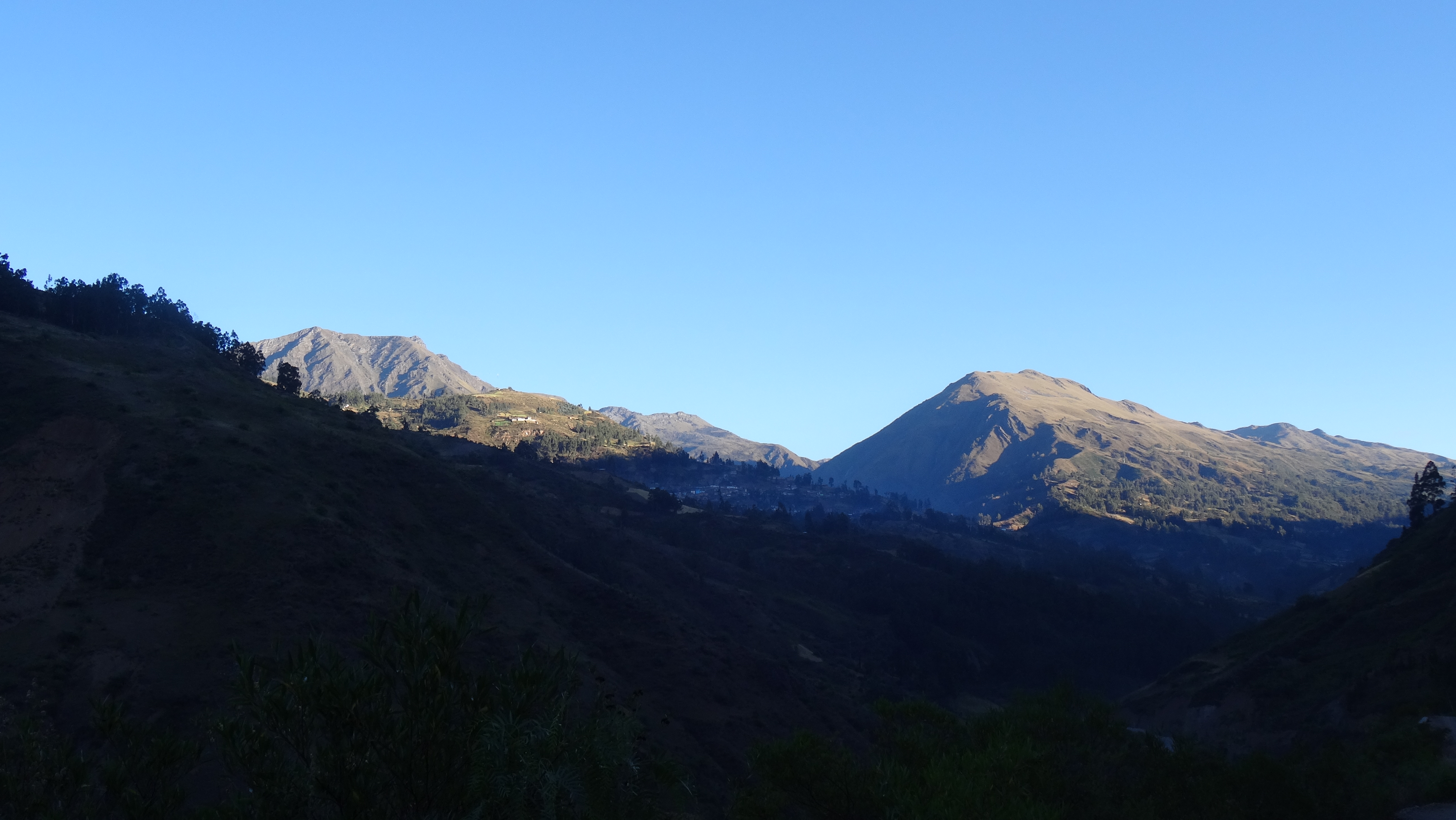 Parte del distrito de Huari, en el centro de la imagen está el plano de la ciudad de Huari, visto desde el camino al C.P. Chinchas del distrito de Cajay.